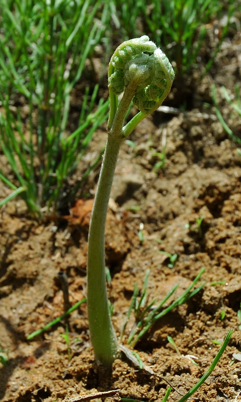 Pteridium aquilinum (Bracken,ワラビ)